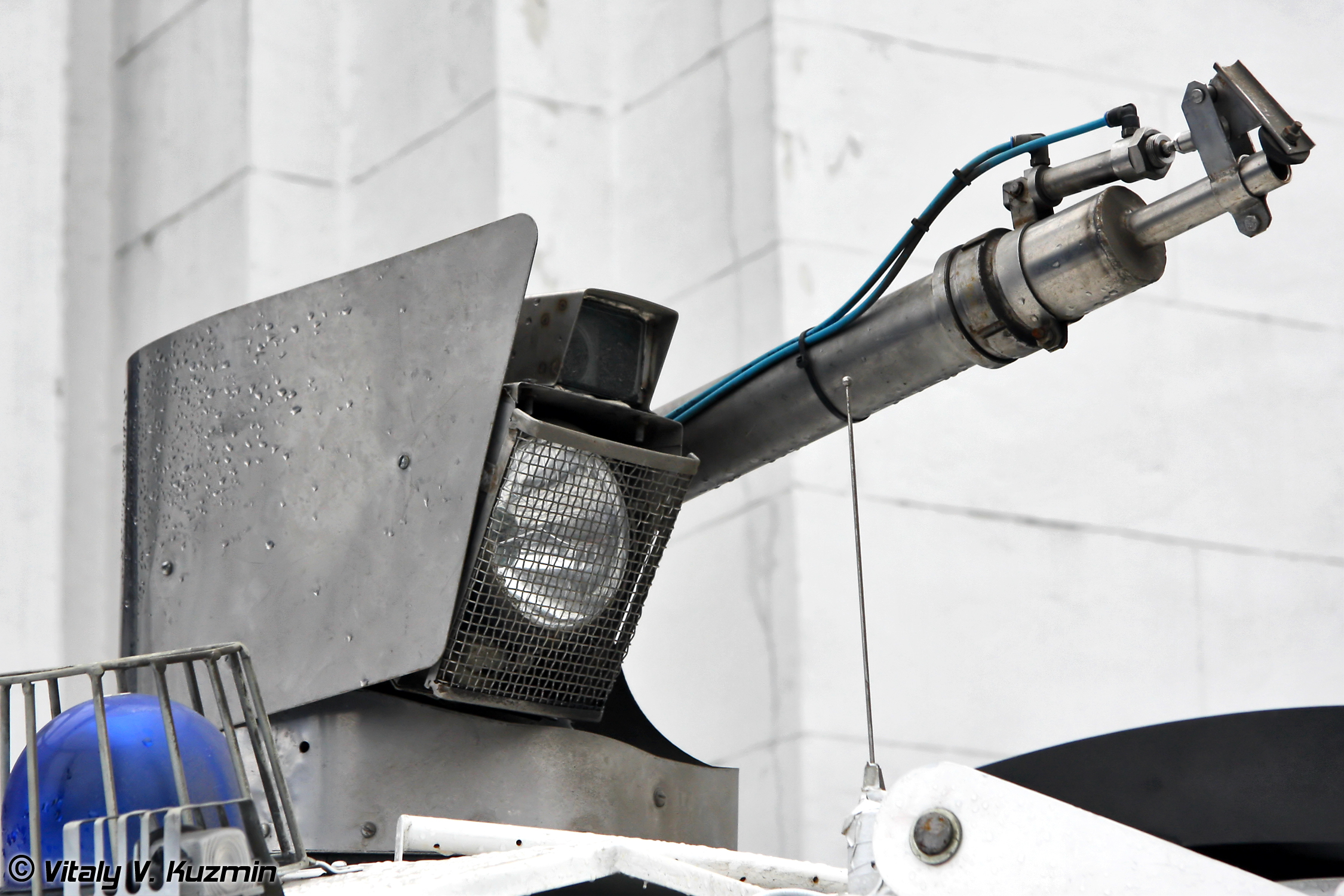 Лафетный ствол (Water gun)